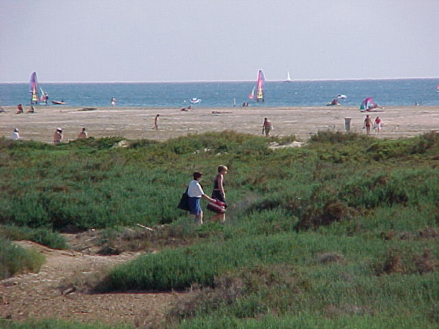 Saladar de la Playa del Matorral, Pájara, Fuerteventura.